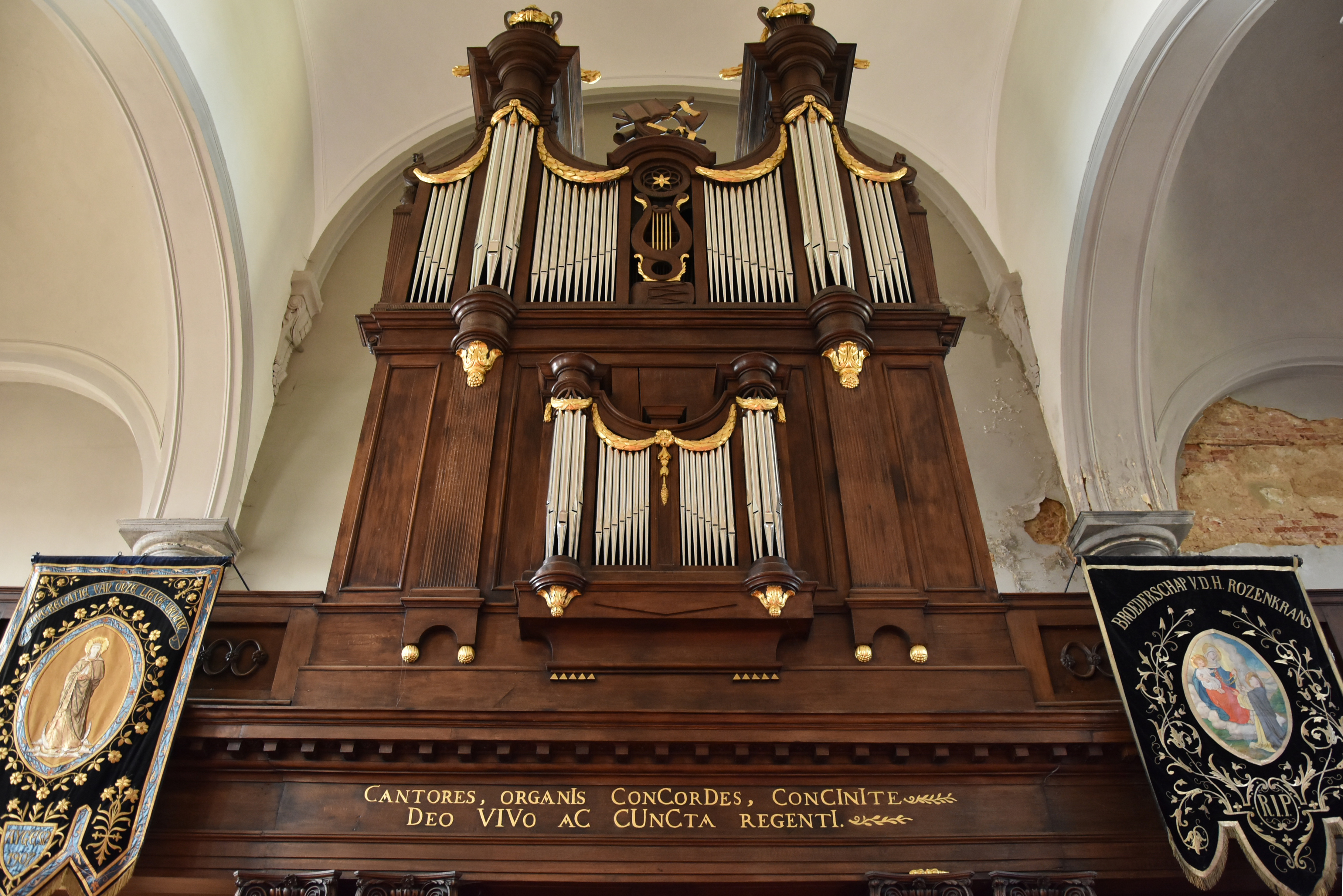 Parochiekerk Sint-Niklaas en Leonardus Aaigem kerkorgel (8958) 5-10-2018 This photo of immovable heritage has been taken in the Flemish Region